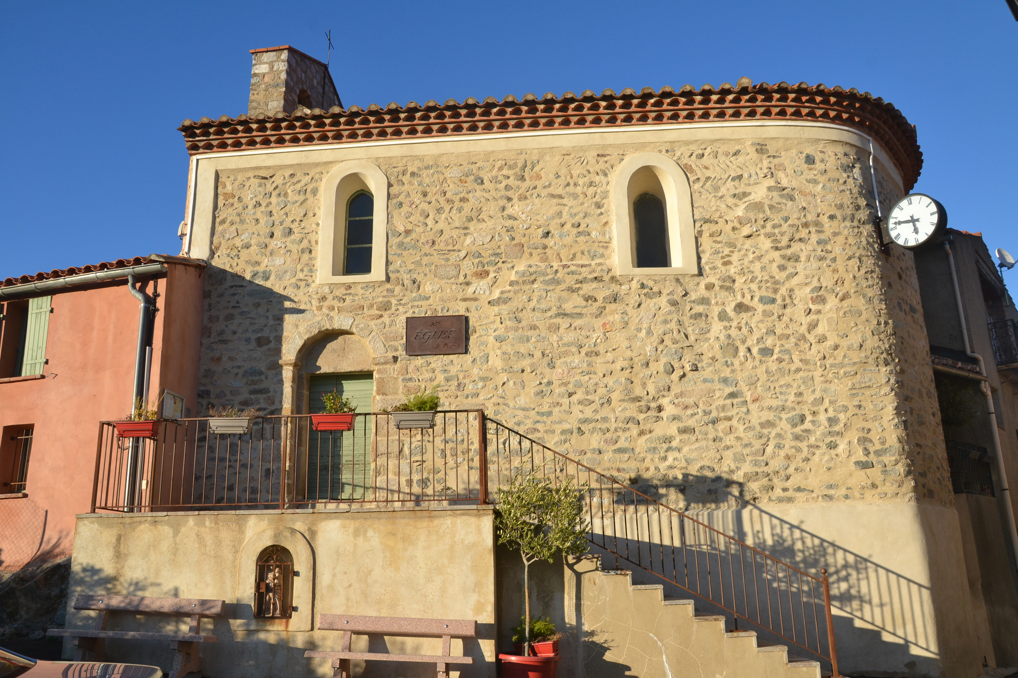 Église de Saint-Arnac (Pyrénées-Orientales, France).